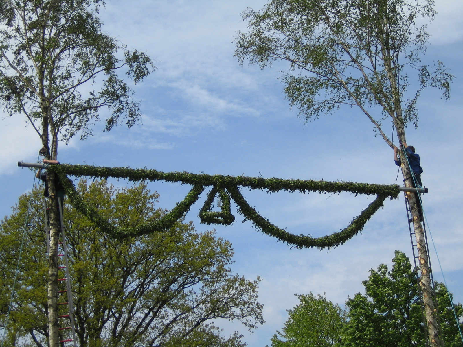 Pfingstgirlande über der Ortseinfahrt in Mechtersen